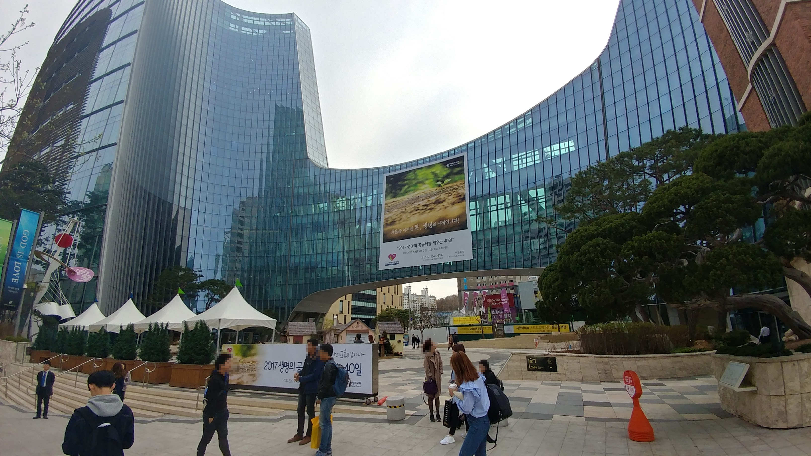 서초 사랑의 교회